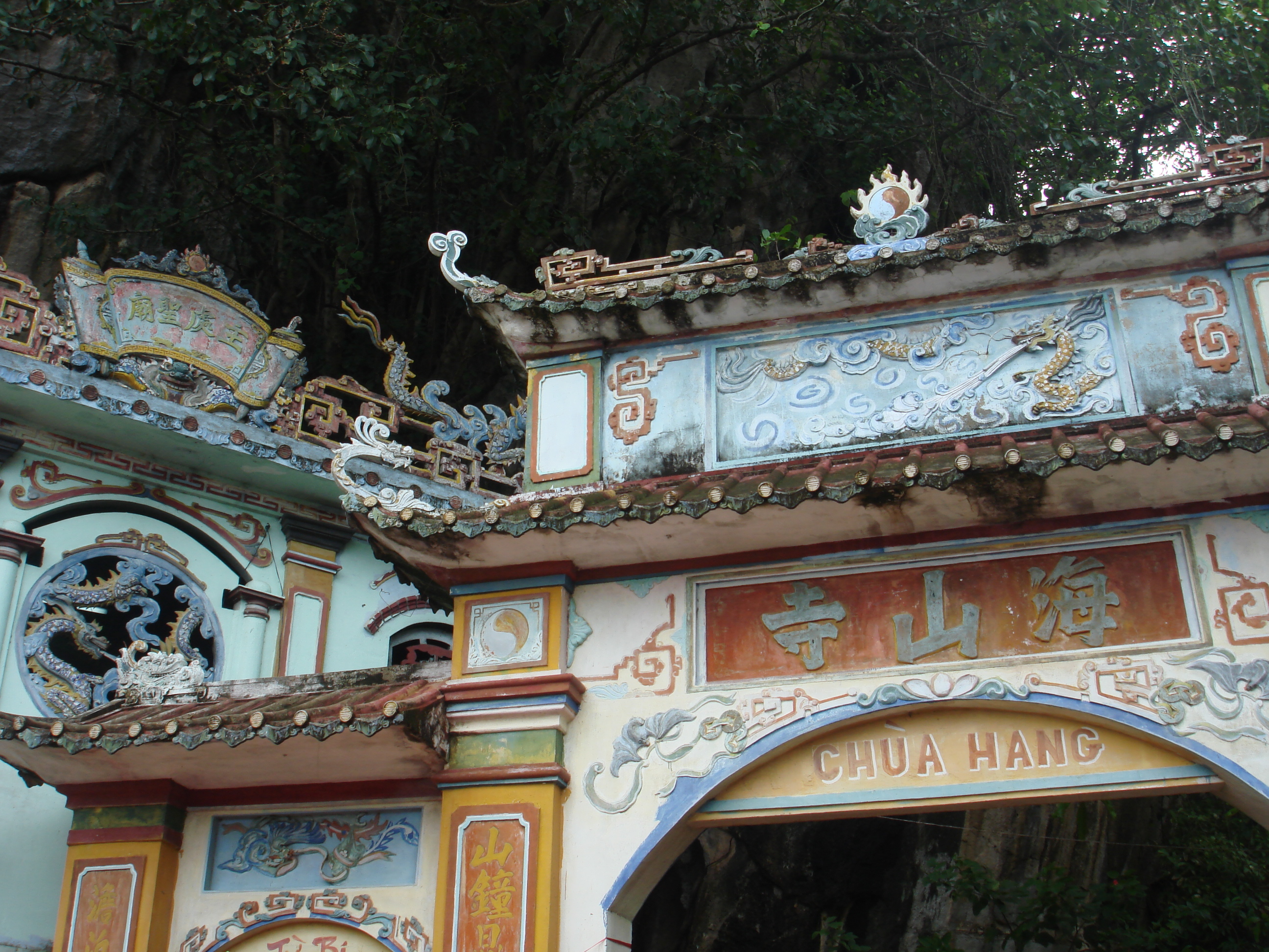 Chùa Hang - Kiên Giang